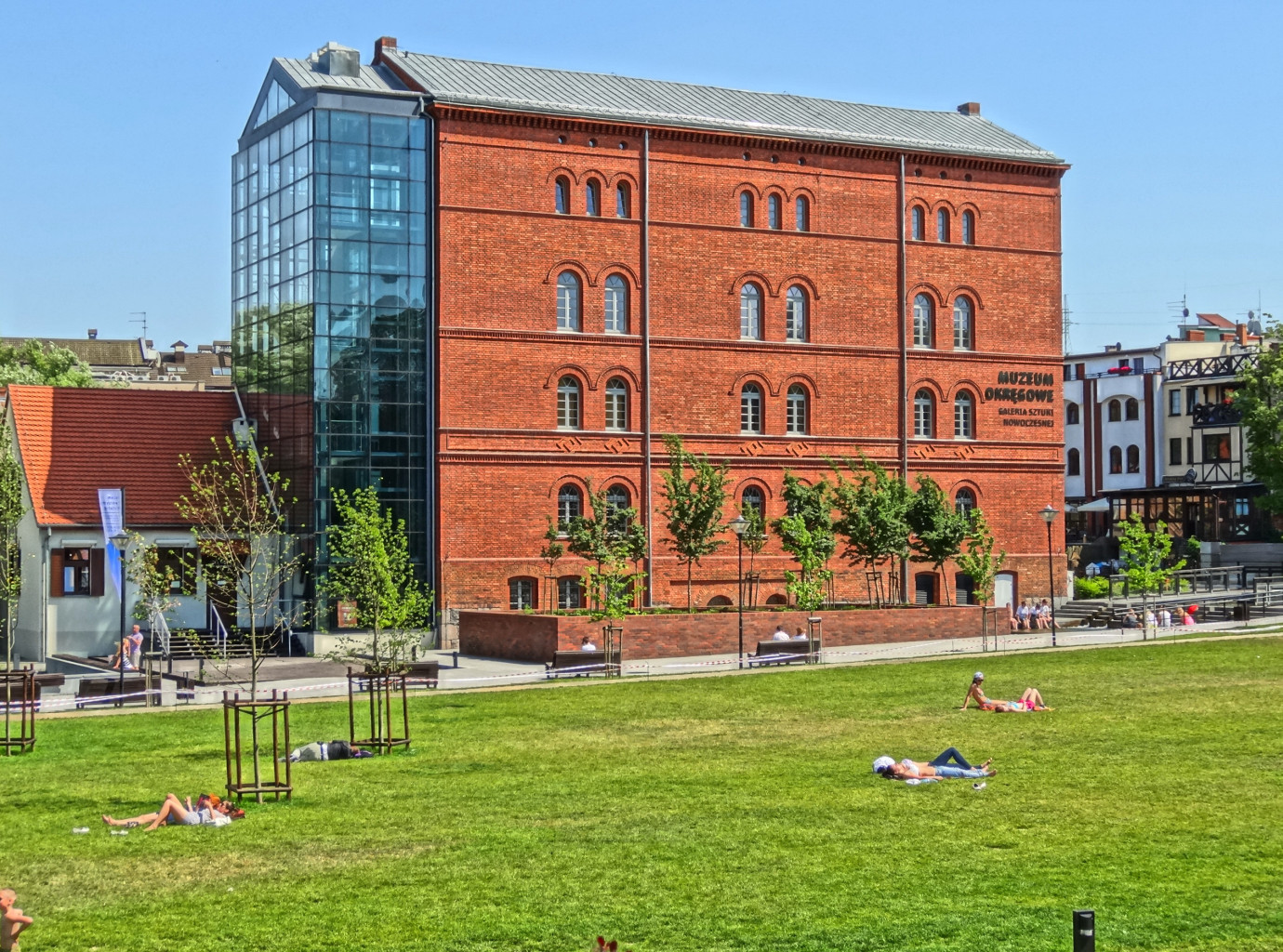 Łąka rekreacyjna na Wyspie Młyńskiej w Bydgoszczy. W tle Czerwony Spichlerz.